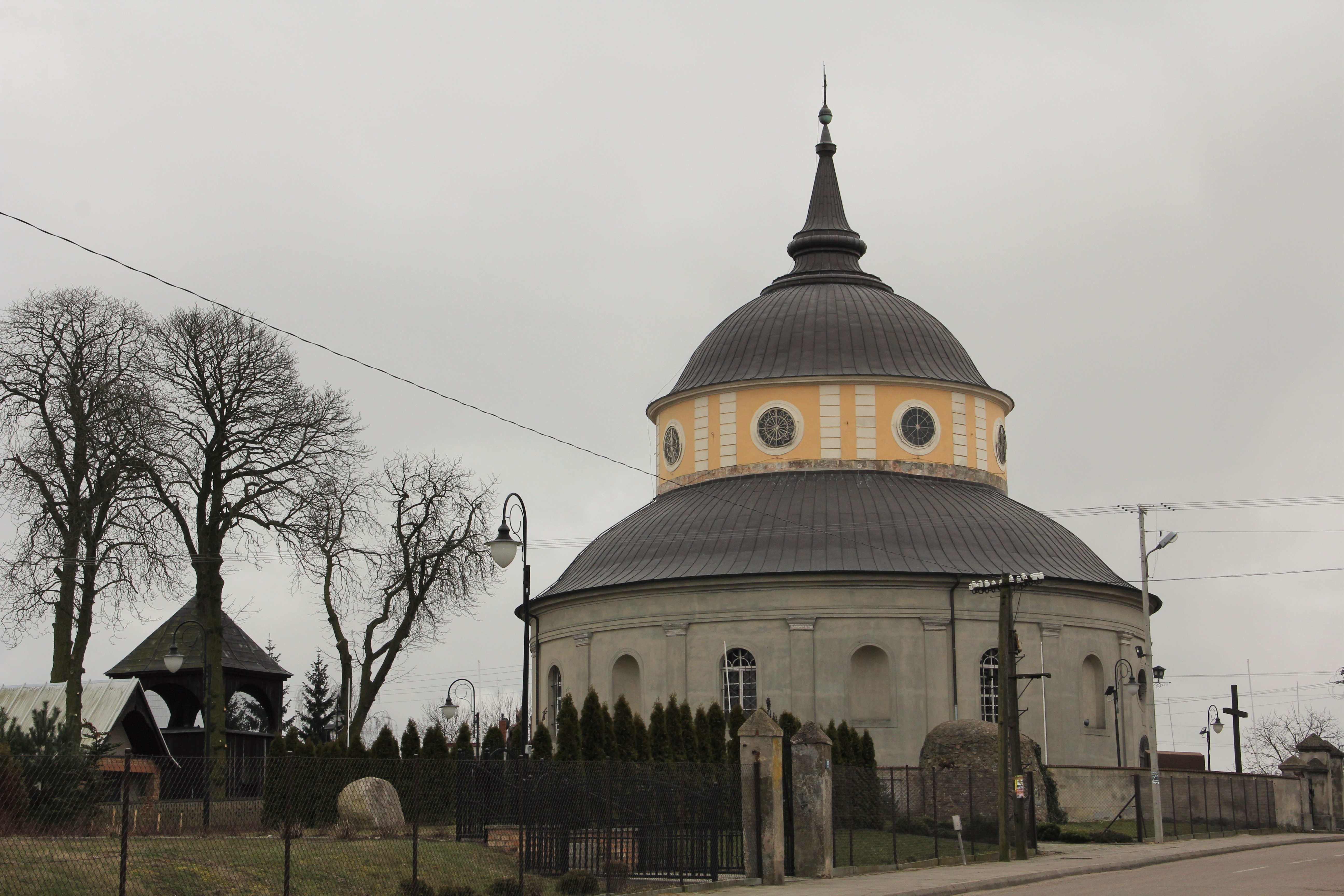 Parkowo, kościół par. p.w. NMP Królowej Świata, 1781-1802